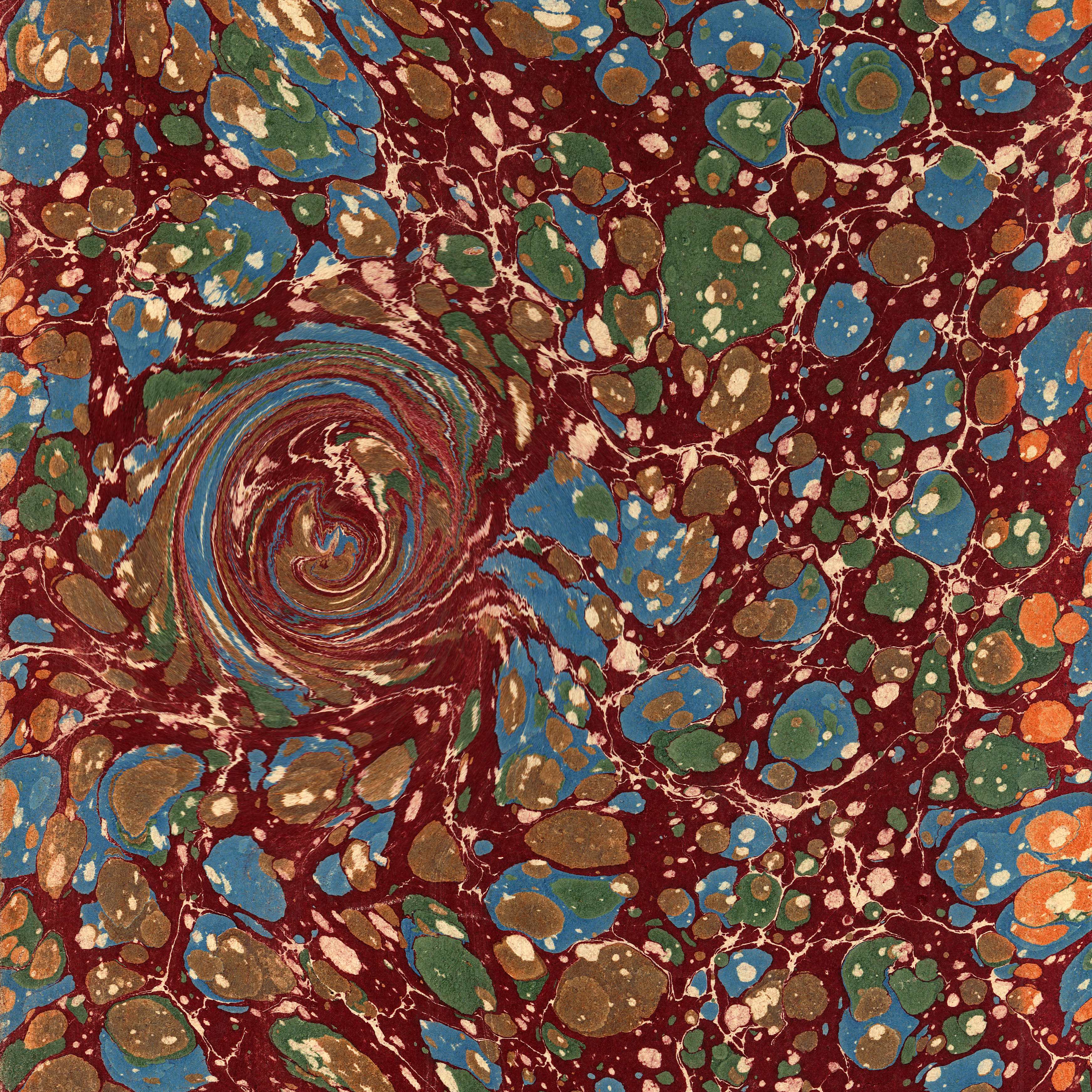 Marbeld Paper